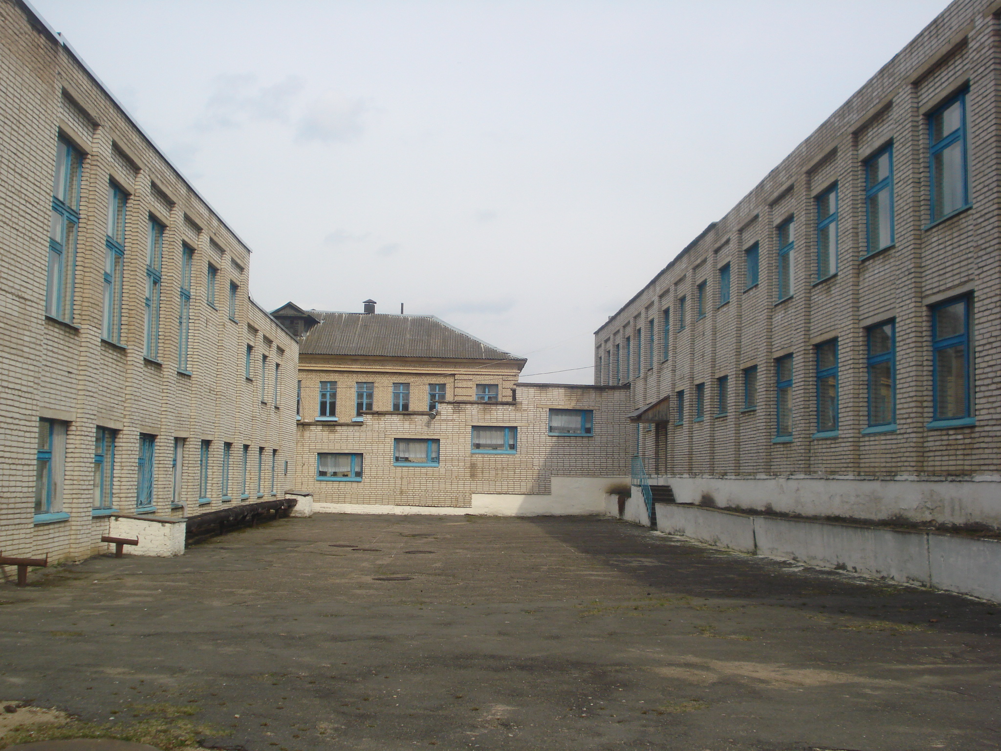 йъя.пло